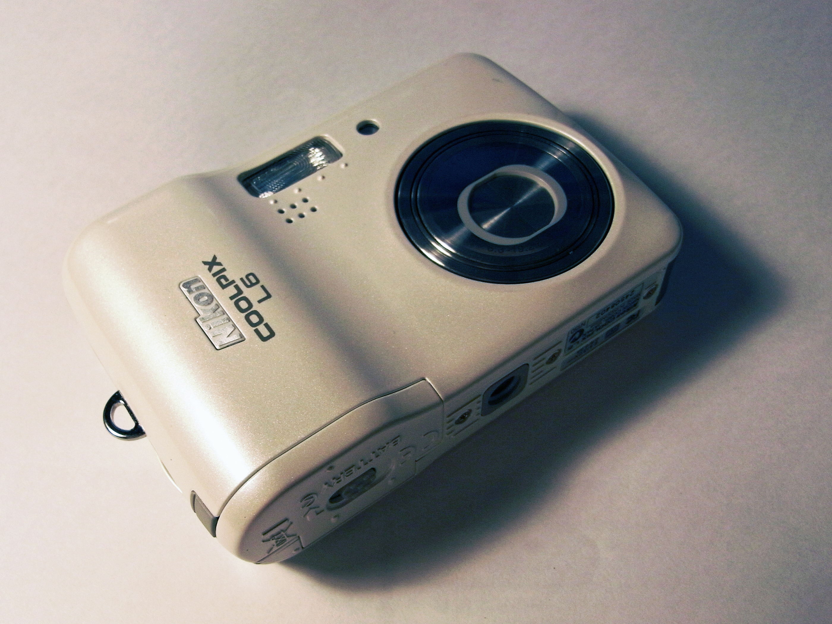 Digital camera Nikon CoolPix L6